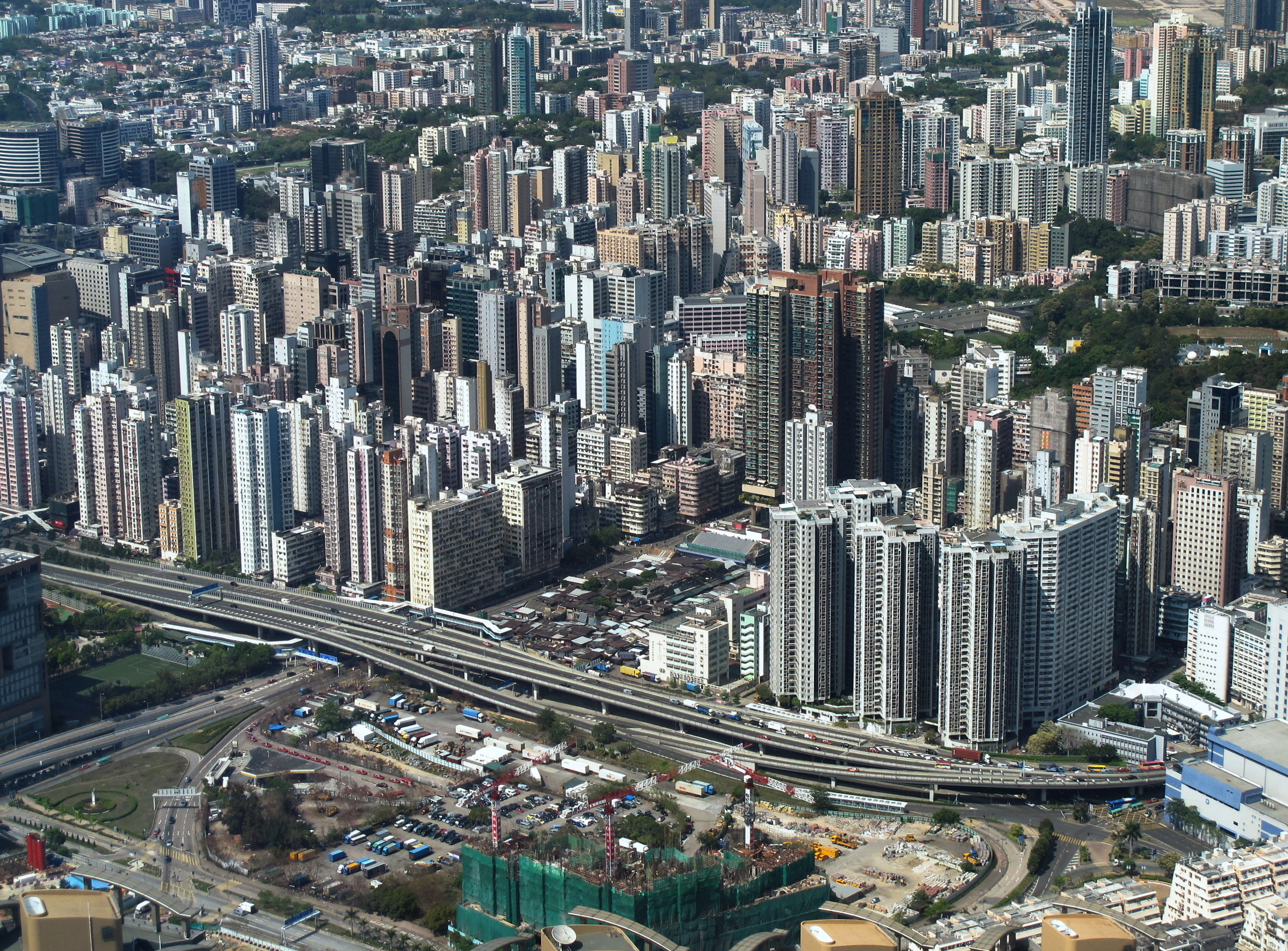 Yau Ma Tei Overview